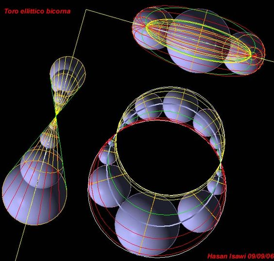 سطح حلقي اهليجي من اعداد الدكتور حسن العيسوي